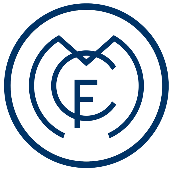 Escudo real madrid